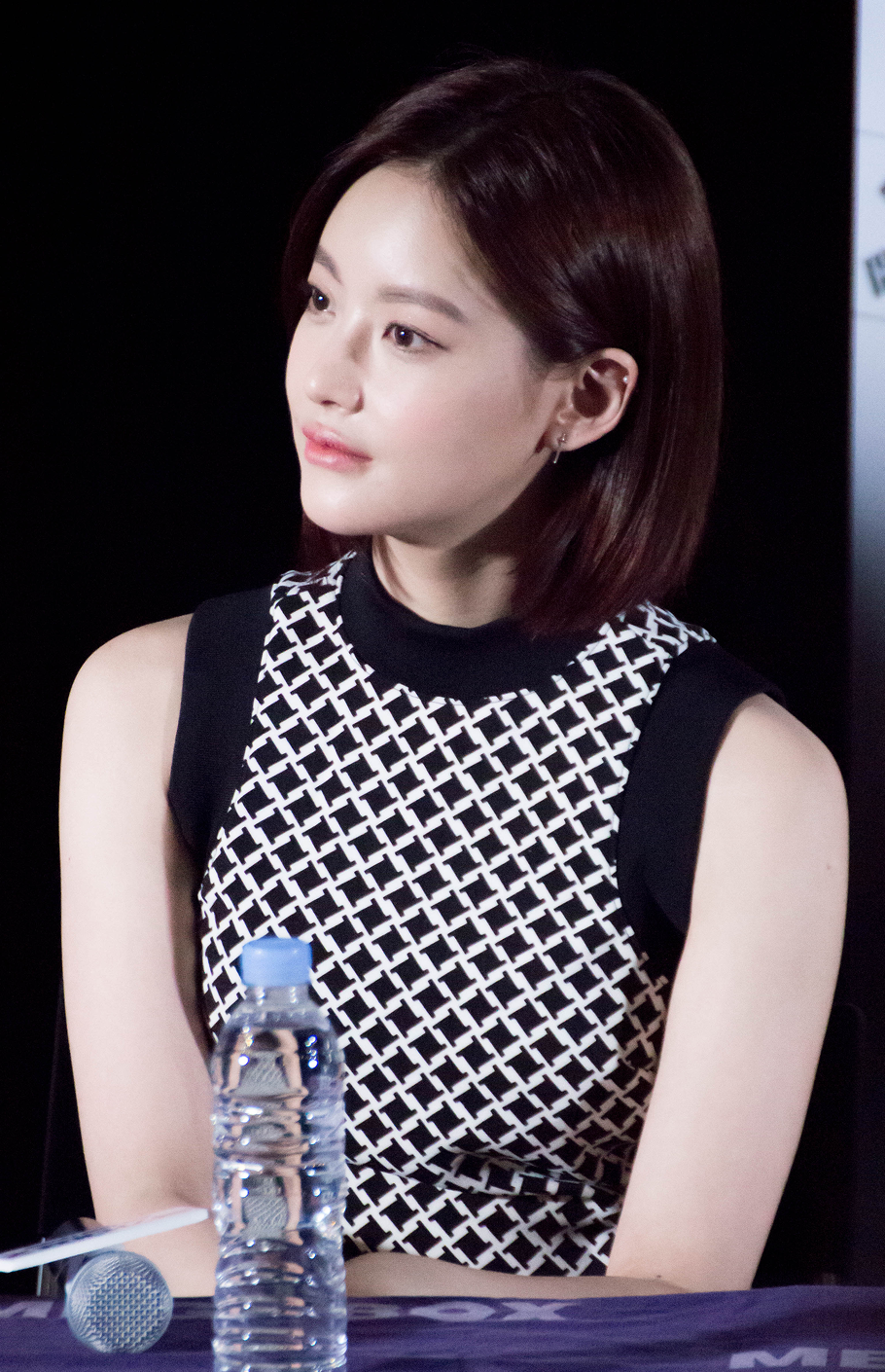 160804 국가대표2 무비토크 오연서